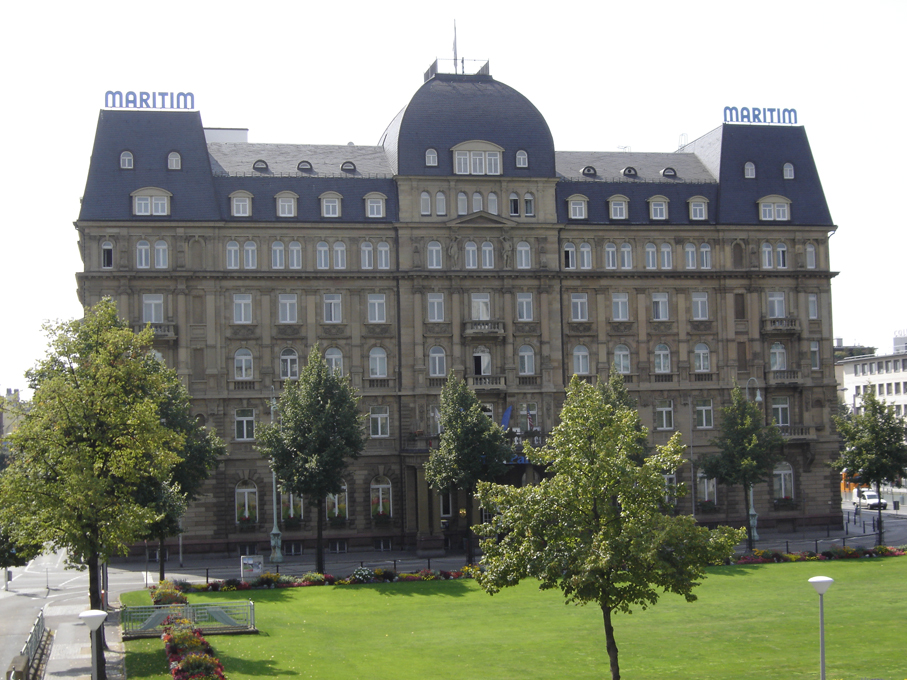 Ehemaliges Parkhotel, jetzt Maritim, in Mannheim.